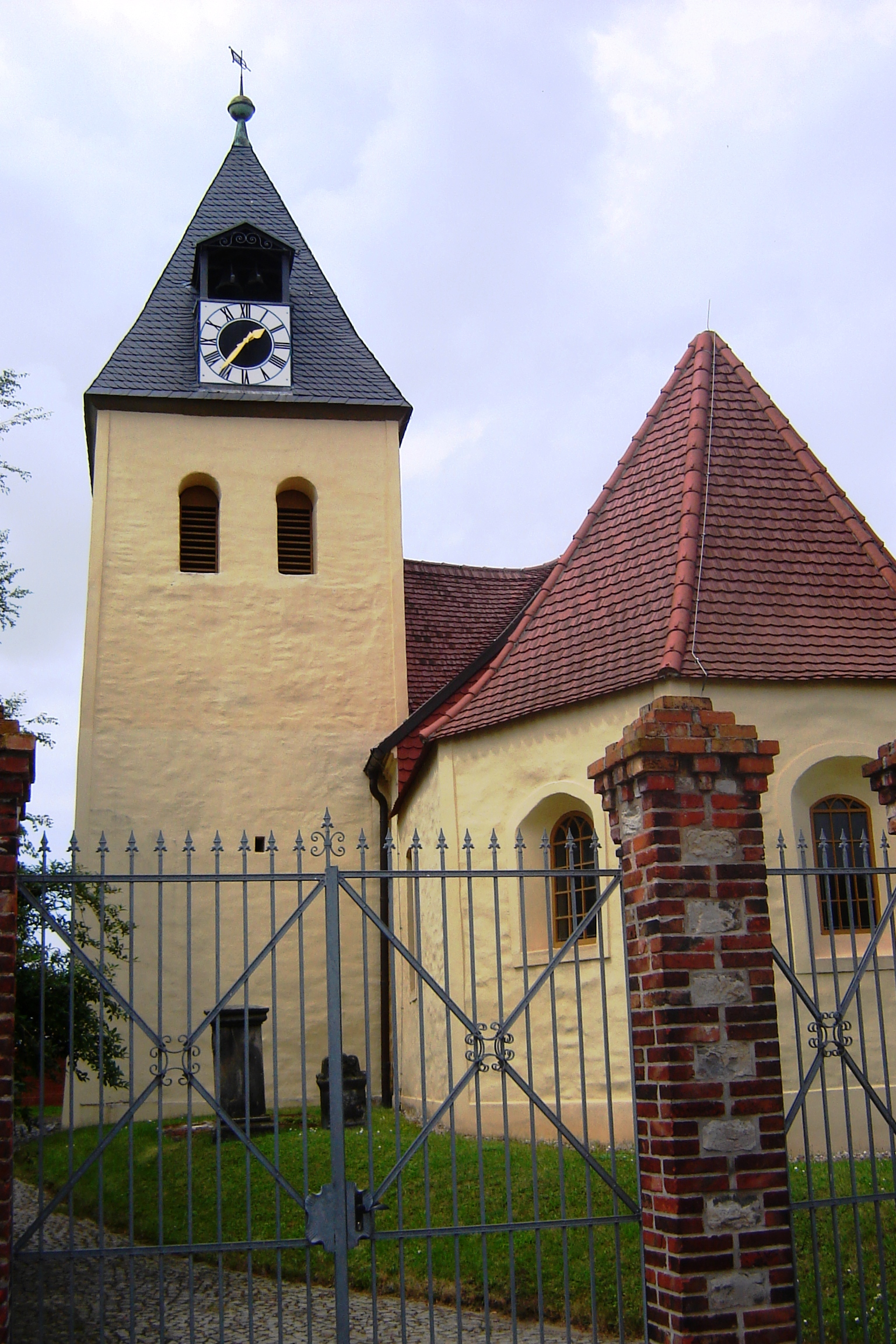 St.-Martin-Kirche in Eggersdorf, Sachsen-Anhalt, Deutschland